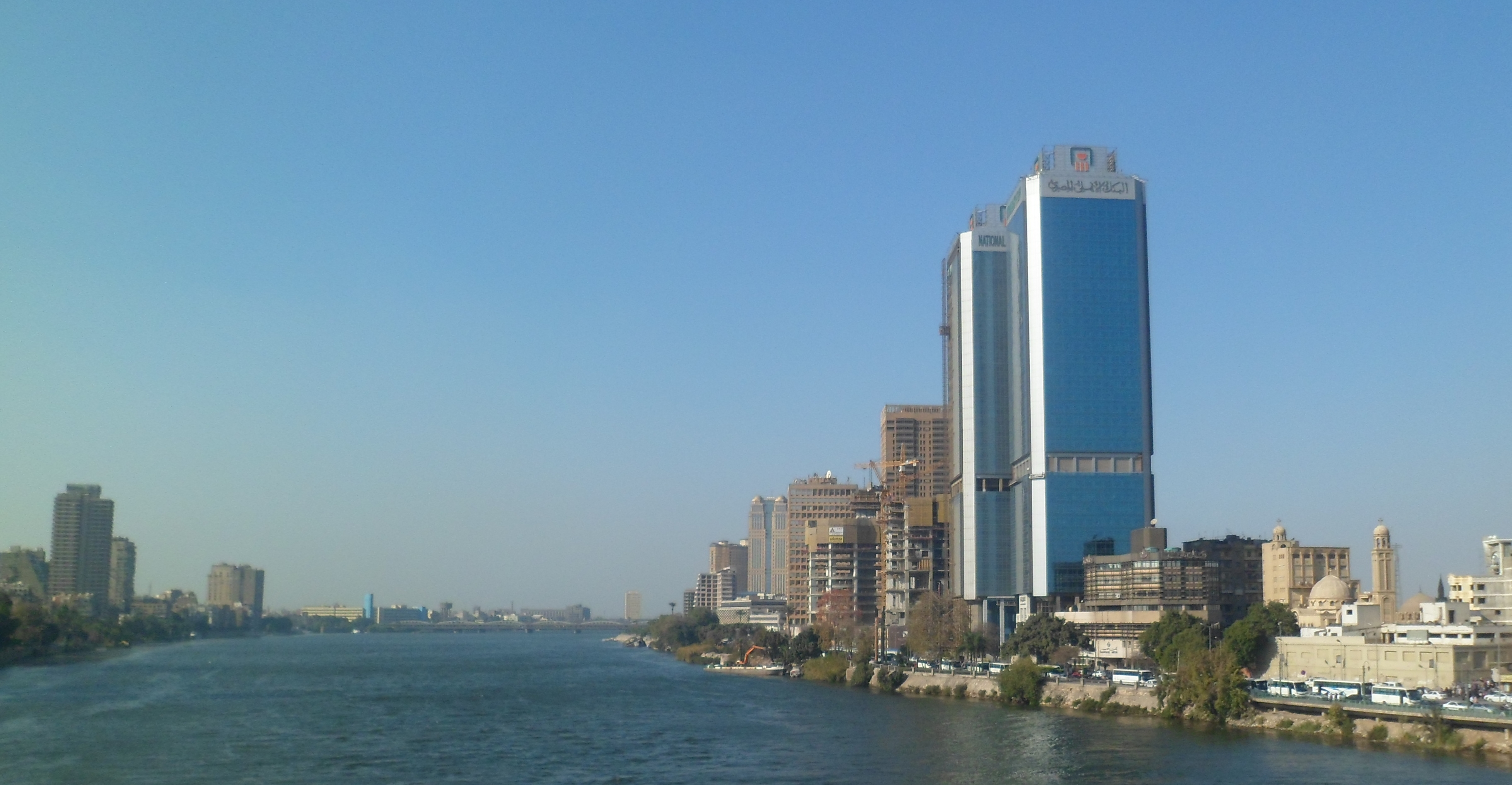 برجي البنك الأهلي المصري بالقاهرة